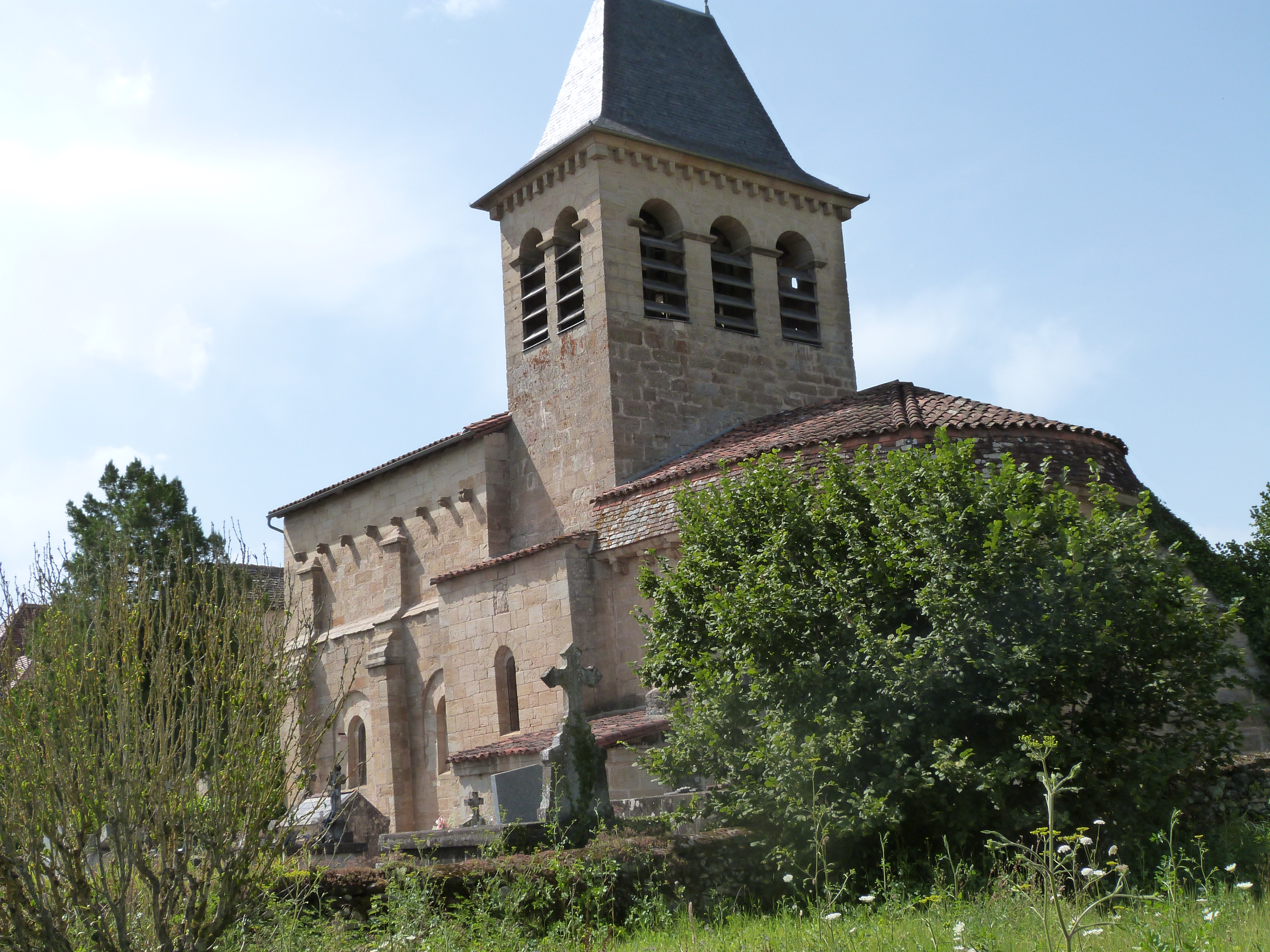 Église Saint-Pierre de Fourmagnac (Inscrit) .